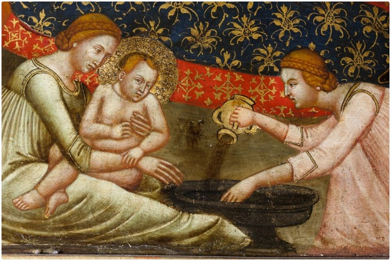 Bain de Jésus, au pied de l'image de la Nativité dans le polyptique de la Cathédrale Sainte Cécile d'Albi